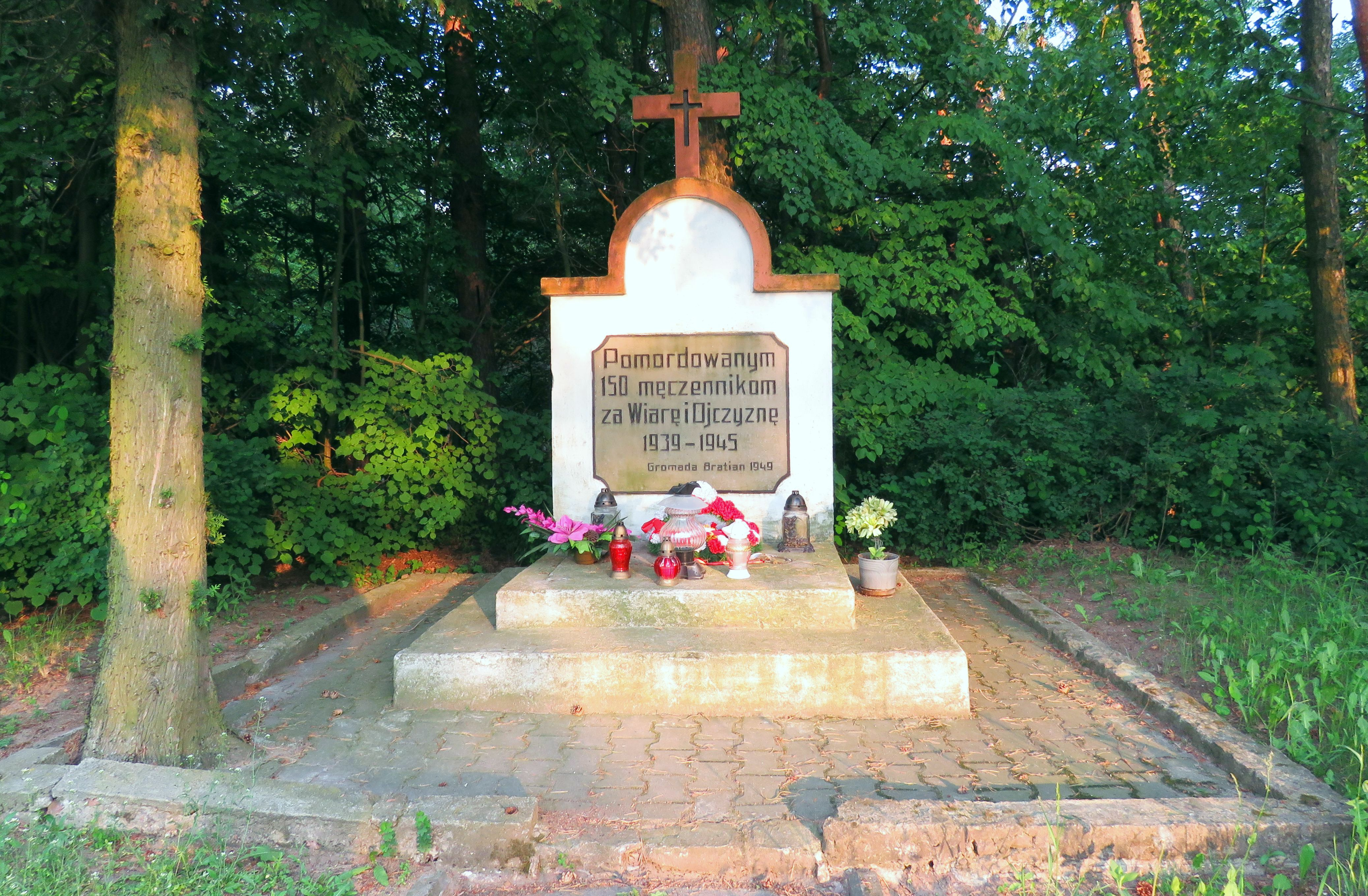 Dla upamiętnienia ofiar mordu w lesie bratiańskim miejscowa społeczność w 1948 r. ufundowała pomnik, który postawiono na miejscu egzekucji. Na pamiątkowej tablicy umieszczono napis „Pomordowanym 150 męczennikom za Wiarę i Ojczyznę. 1939-1945”.